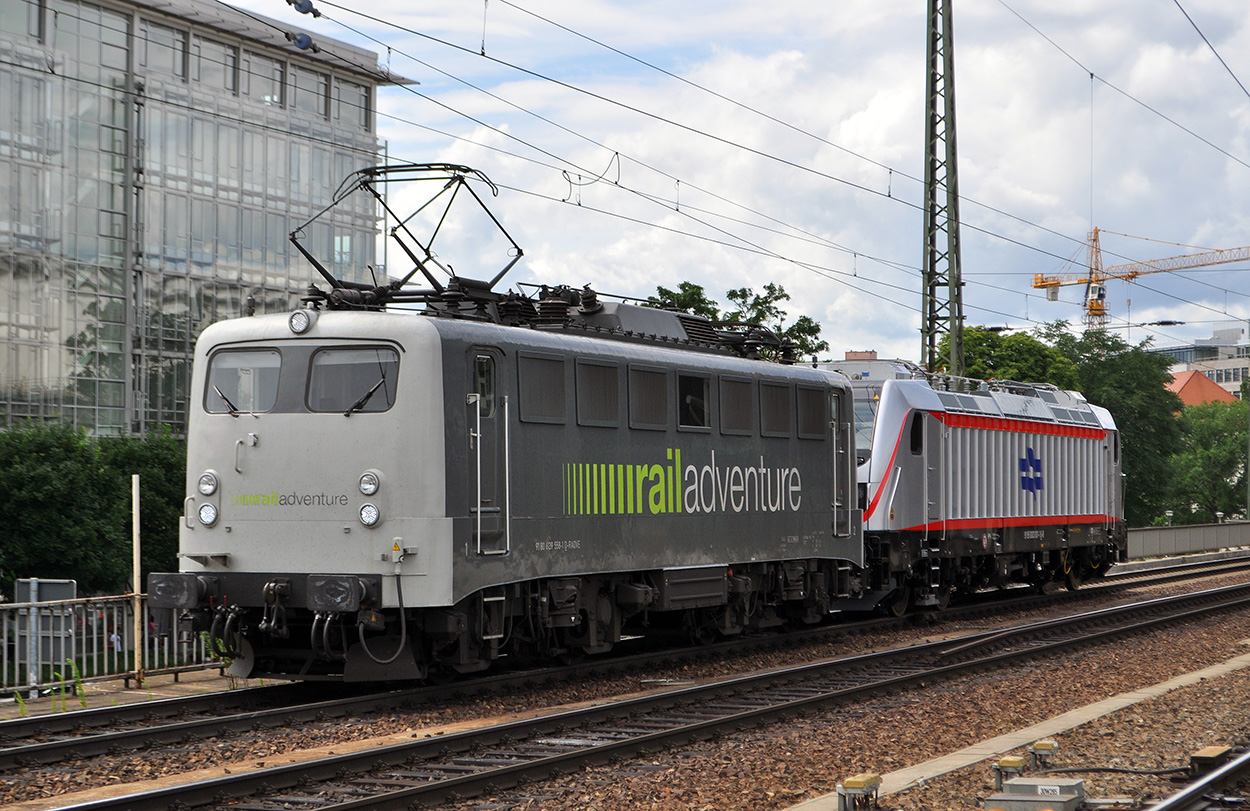 ех E 40 1558 Построен: 01.1965 — Krauss-Maffei 14.01.1965 — передан DB · Deutsche Bundesbahn 26.01.1965 — введён в эксплуатацию 01.01.1968 — обозначен 139 558-1 01.01.1994 — перешёл к DB AG · Deutsche Bahn AG, GB Traktion с 01.01.1998 — DB AG · Deutsche Bahn AG, GB Ladungsverkehr с 01.07.1999 — DB Cargo AG с 01.09.2003 — Railion Deutschland AG 01.01.2007 — присвоен NVR-номер: 91 80 6139 558-1 D-DB с 16.02.2009 — DB Schenker Rail Deutschland AG 21.02.2009 — переведён в запас 22.09.2010 — отставлен от эксплуатации __.11.2011 — продан RailAdventure GmbH, München, присвoено имя "Albert Jonker", NVR-номер: 91 80 6139 558-1 D-RADVE